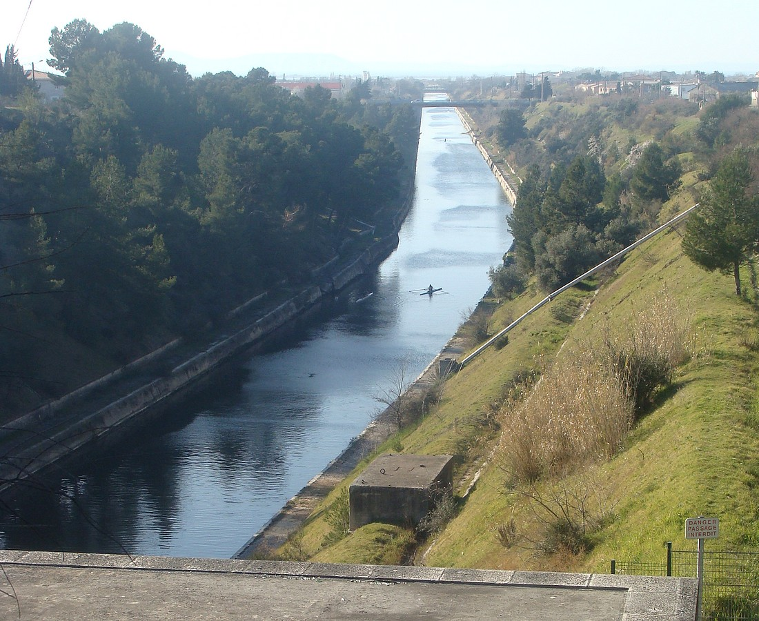 Le canal de Marseille au Rhône à Marignane, vue prise en direction du nord-ouest depuis la tête du tunnel du Rove. L'étang de Berre est au fond.